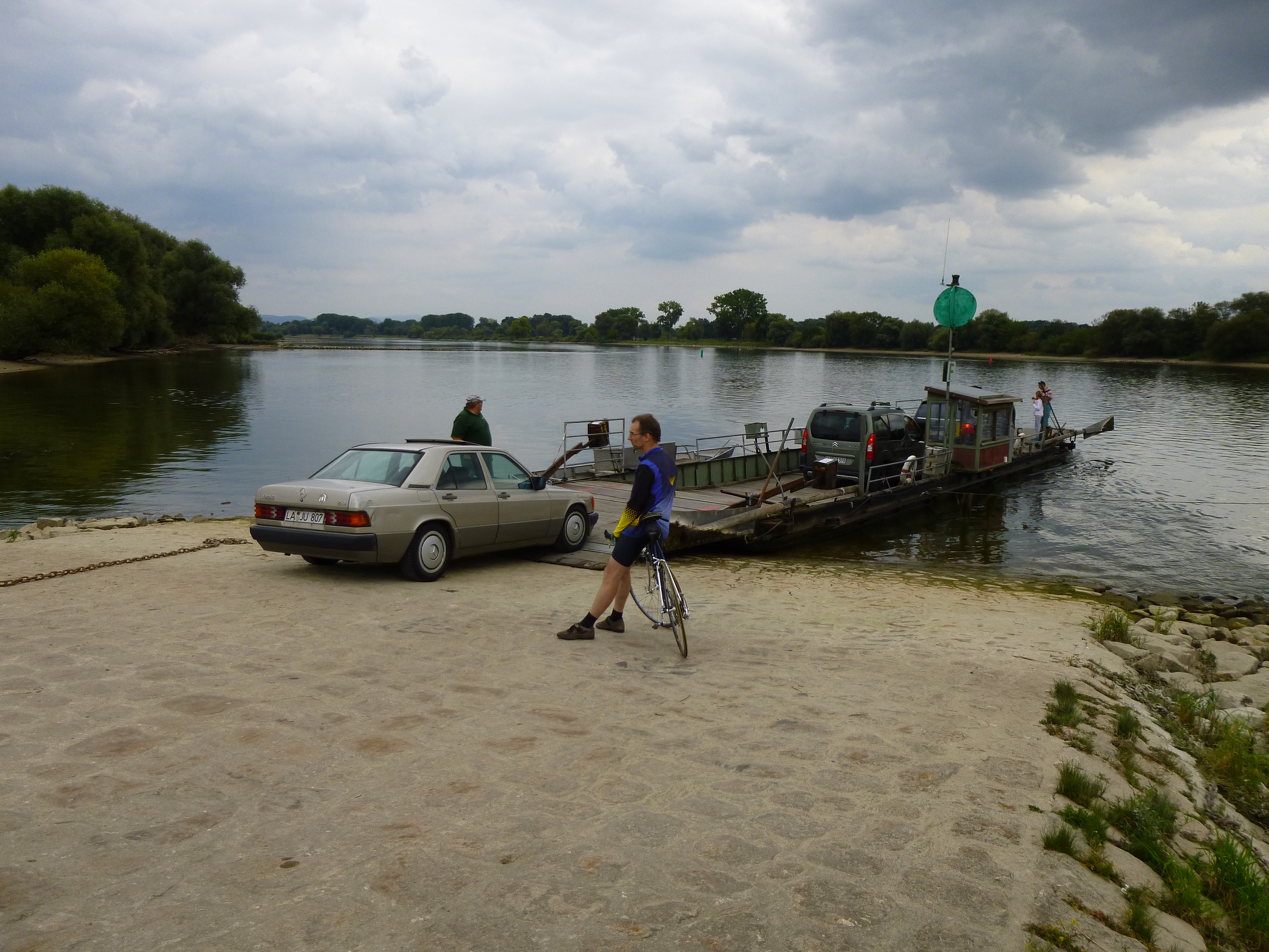 Autos beim Auffahren auf die Donaufähre bei Mariaposching im Landkreis Straubing-Bogen. Die Fähre setzt nach Stephansposching über. Radfahrer und Fußgänger gehen zuletzt auf die Fähre.